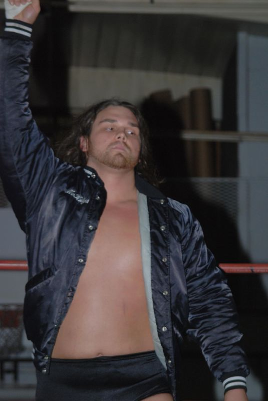 David K. Charwood en octobre 2007.